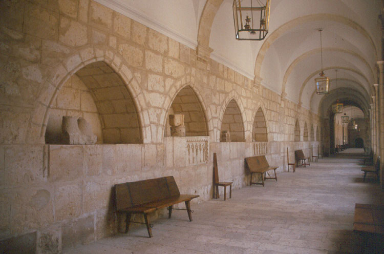 Monasterio. Sepulcros - La Santa Espina (Valladolid) - Diapositiva 48 x 48 Color